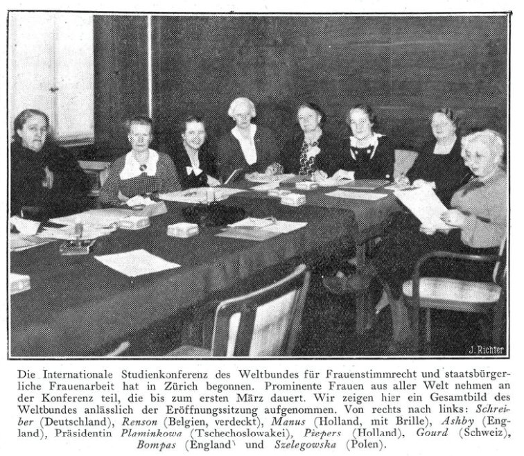 1937. Internationale Studienkonferenz des Weltbundes für Frauenstimmrecht und staatsbürgerliche Frauenarbeit, in Zürich. Foto J. Richter